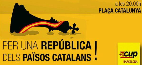 Convocatòria de la Candidatura d'Unitat Popular contra la coronació de Felip de Borbó com a rei dels catalans sota dominació espanyola el 2 de juny de 2014 a cada municipi.